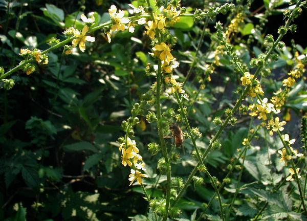 Agrimonia eupatoria: Flowers, leaves and fruits